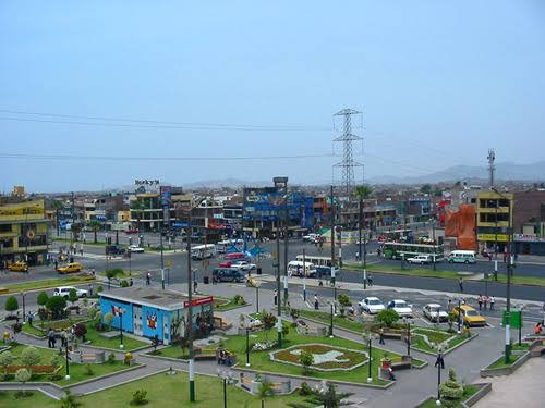 Los olivos , Lima , Perú .